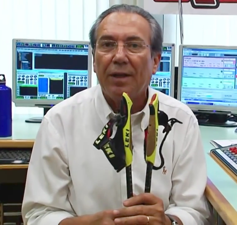 Justo Molinero, locutor de ràdio i president del grup TeleTaxi